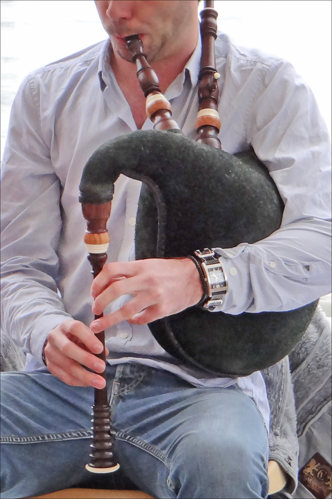 Sonneur de veuze dans le cadre du festival Les Orientales Musiques et traditions d'Orient Saint-Florent-le-Vieil